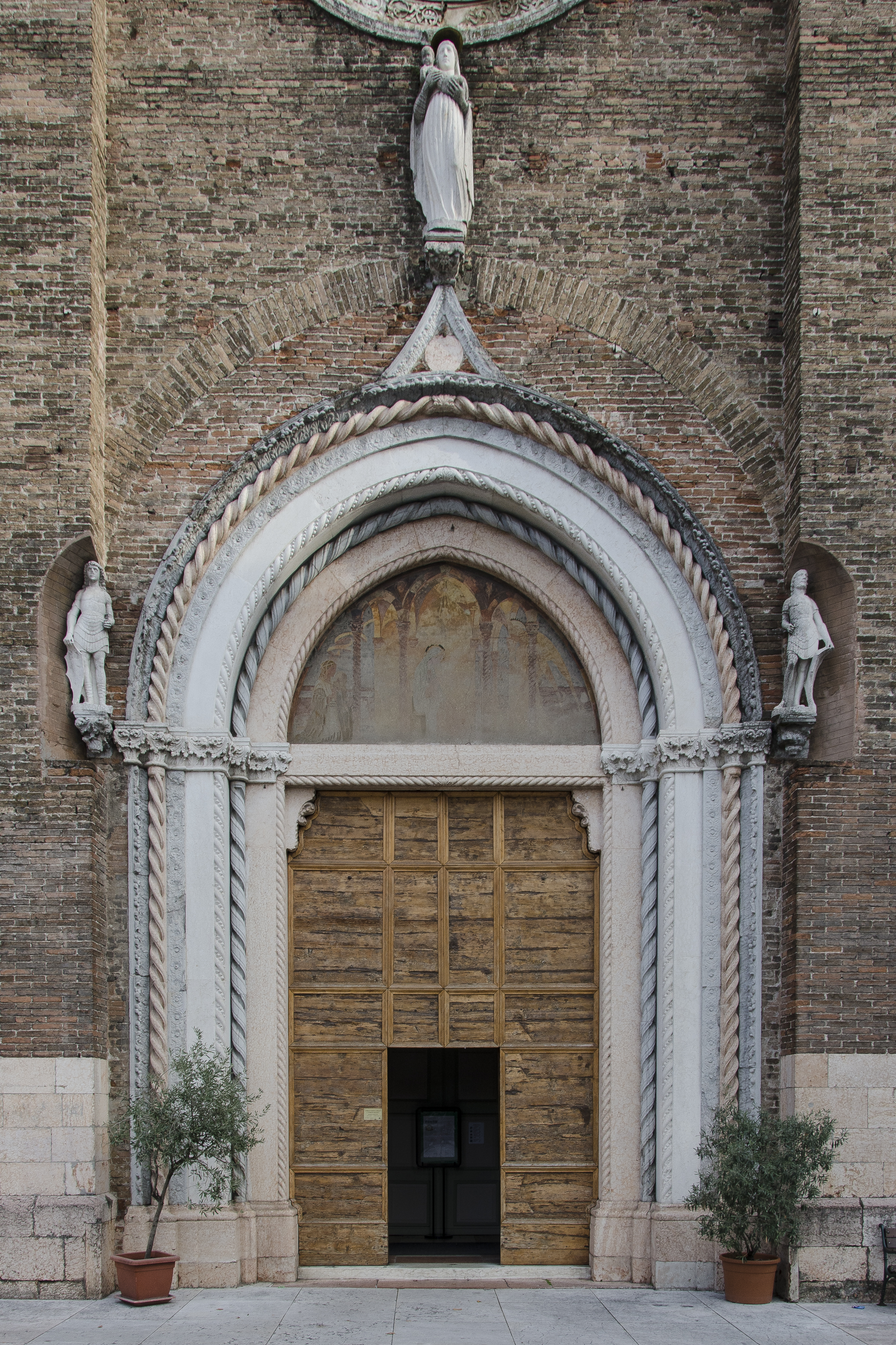 Veduta del portale